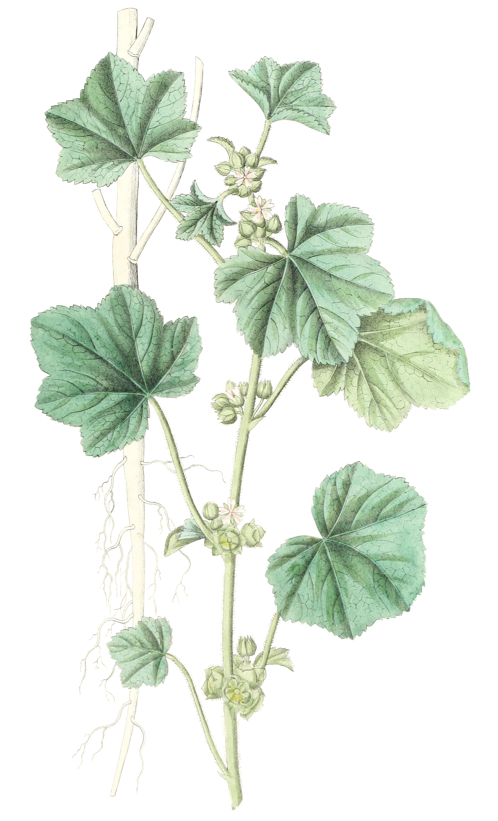 Illustration of Malva pusilla Smith